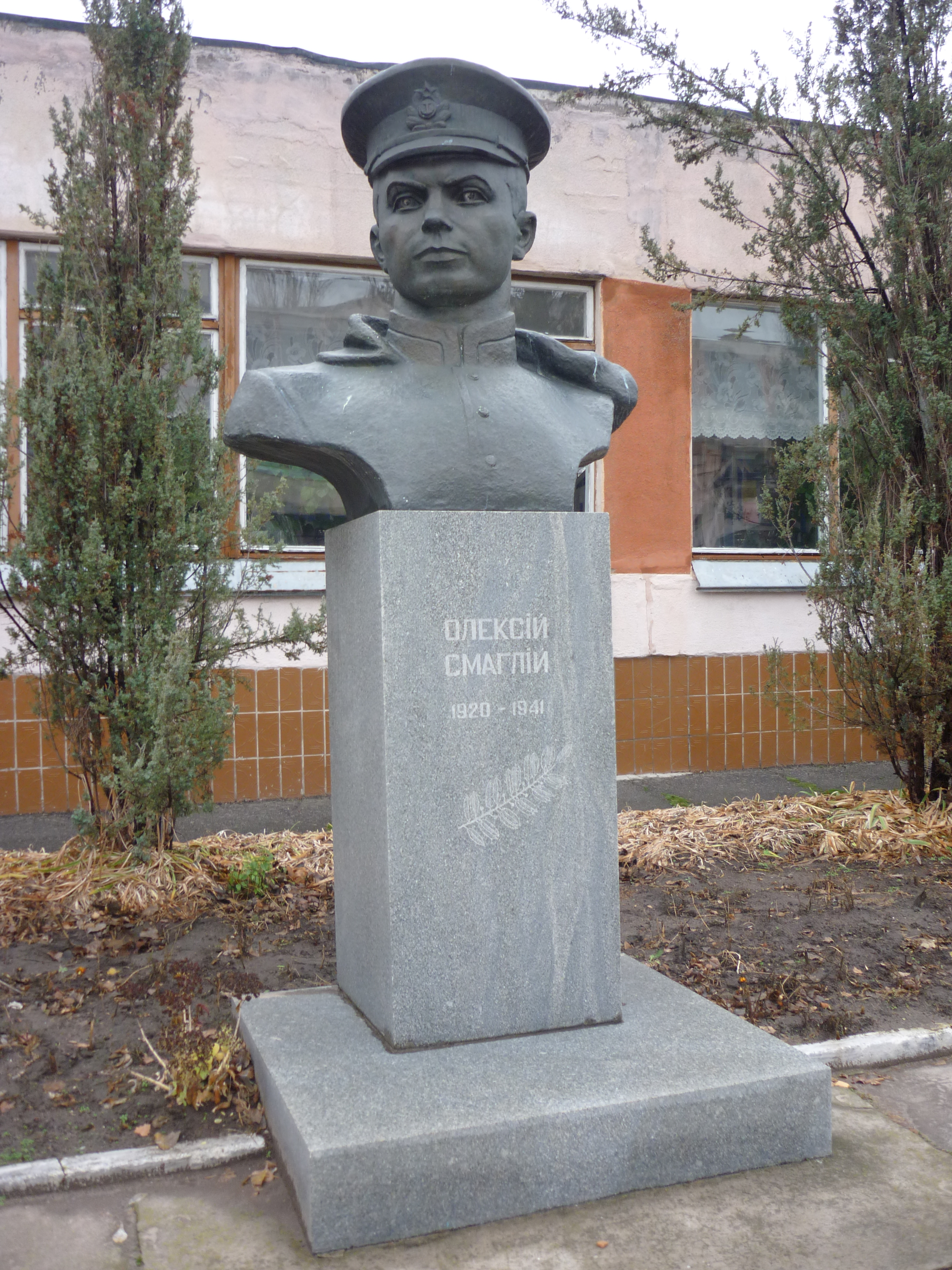 Погруддя на честь Героя Радянського Союзу Смаглія О.В. на території школи №26 міста Черкаси